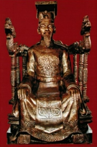 Tượng vua Trần Nghệ Tông